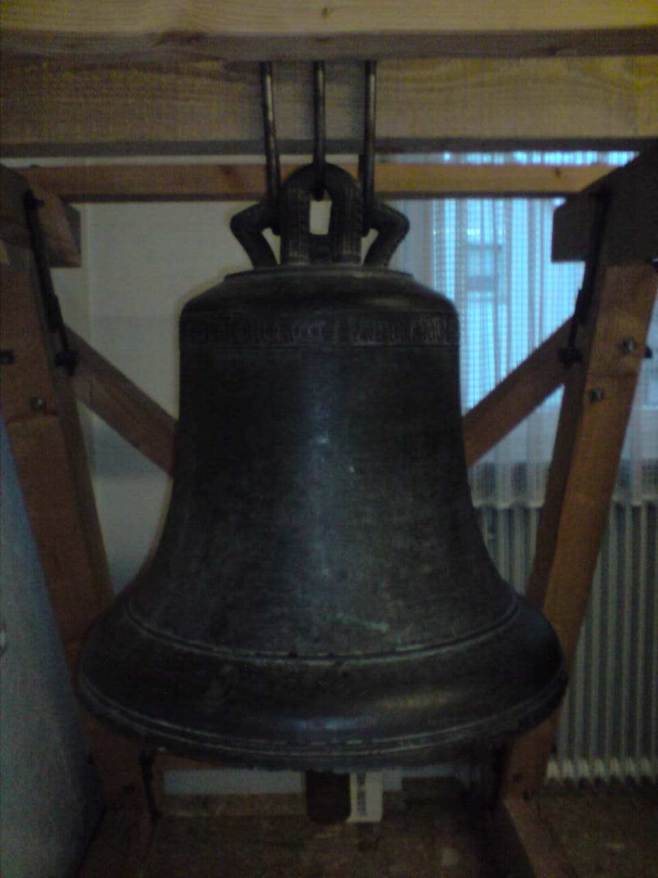 Alte Kirchturmglocke Büchenaus von 1776